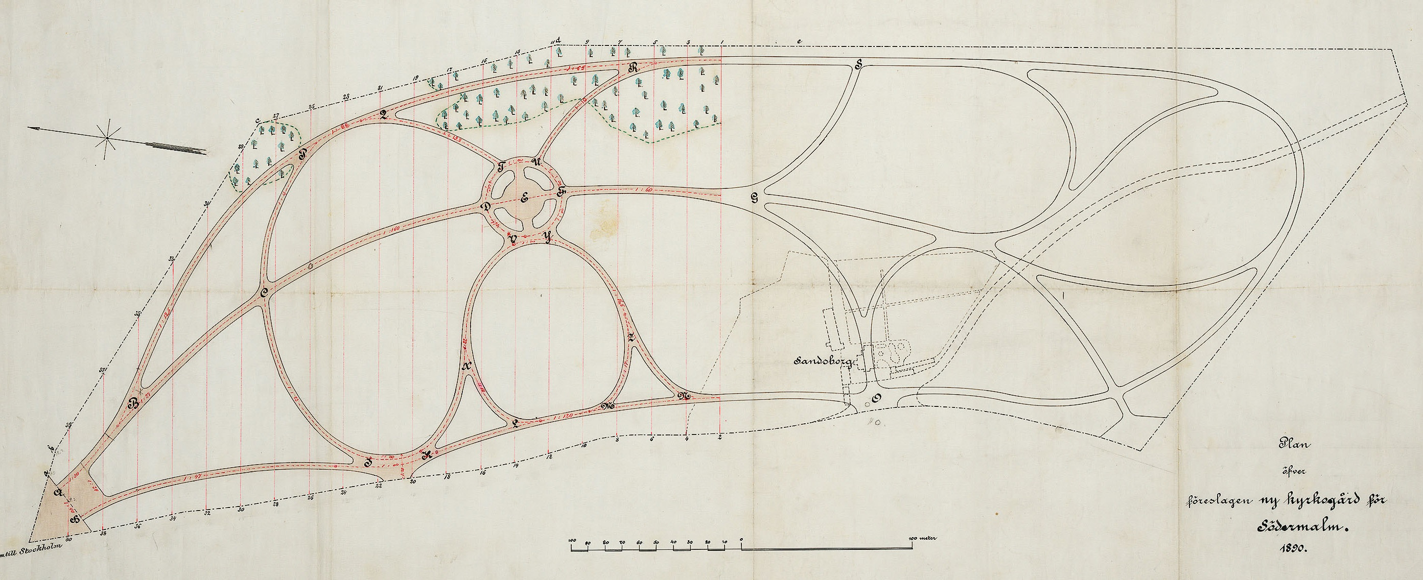 Karta över Nya Södra Begravningsplatsen (Sandsborgskyrkogården)